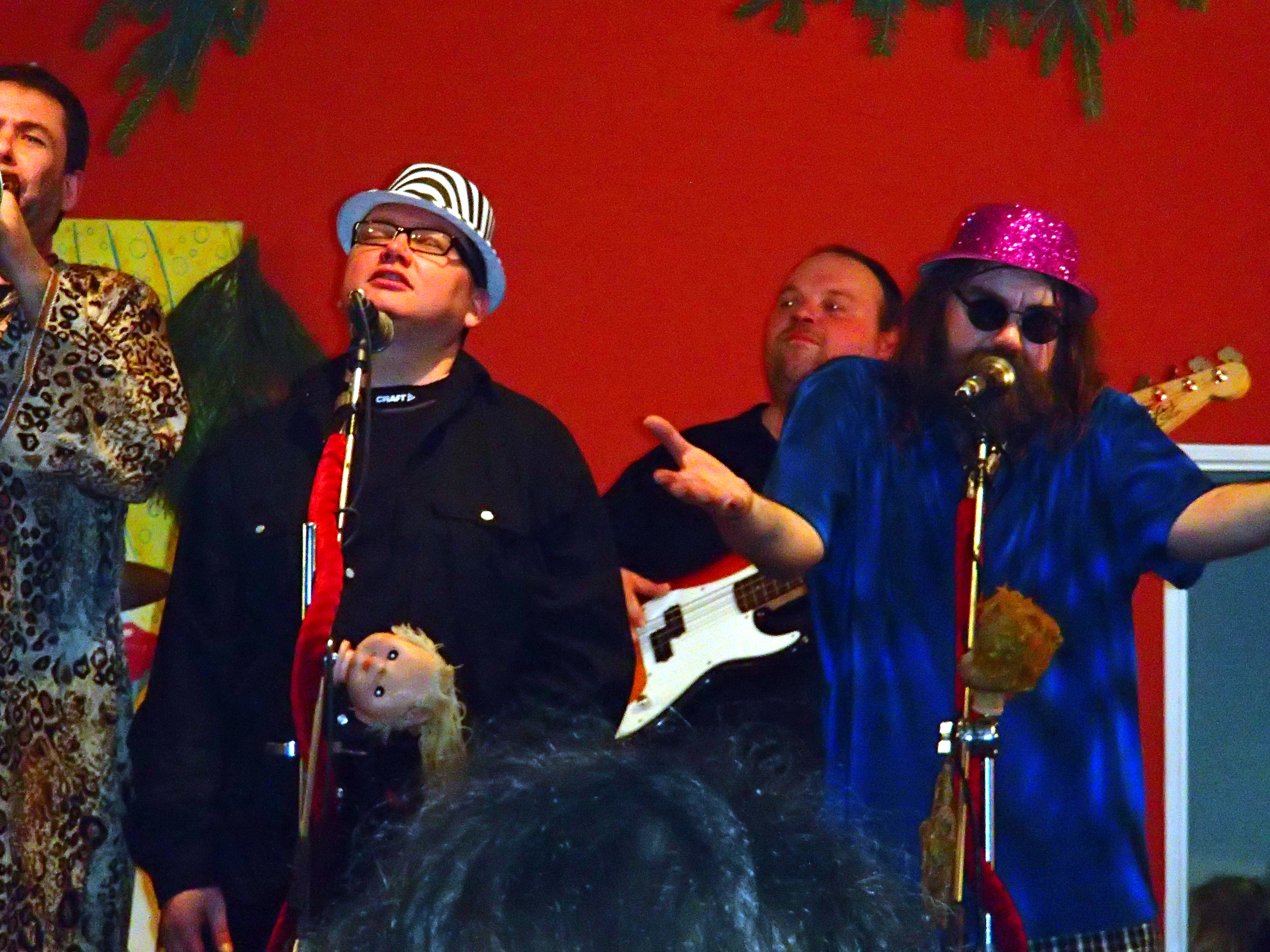 Skupina BBP. V popředí Z. A. Hrtan a Otto Sepl.